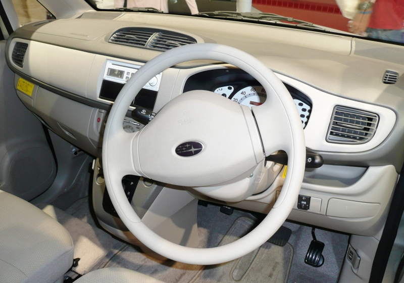 Subaru Stella interior.